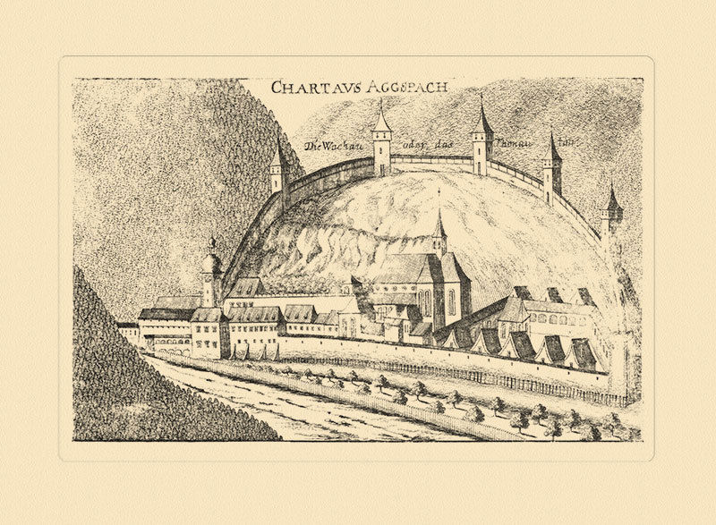 Chartreuse d'Aggsbach par Georg Matthäus Vischer (1628-1696). Gravure.